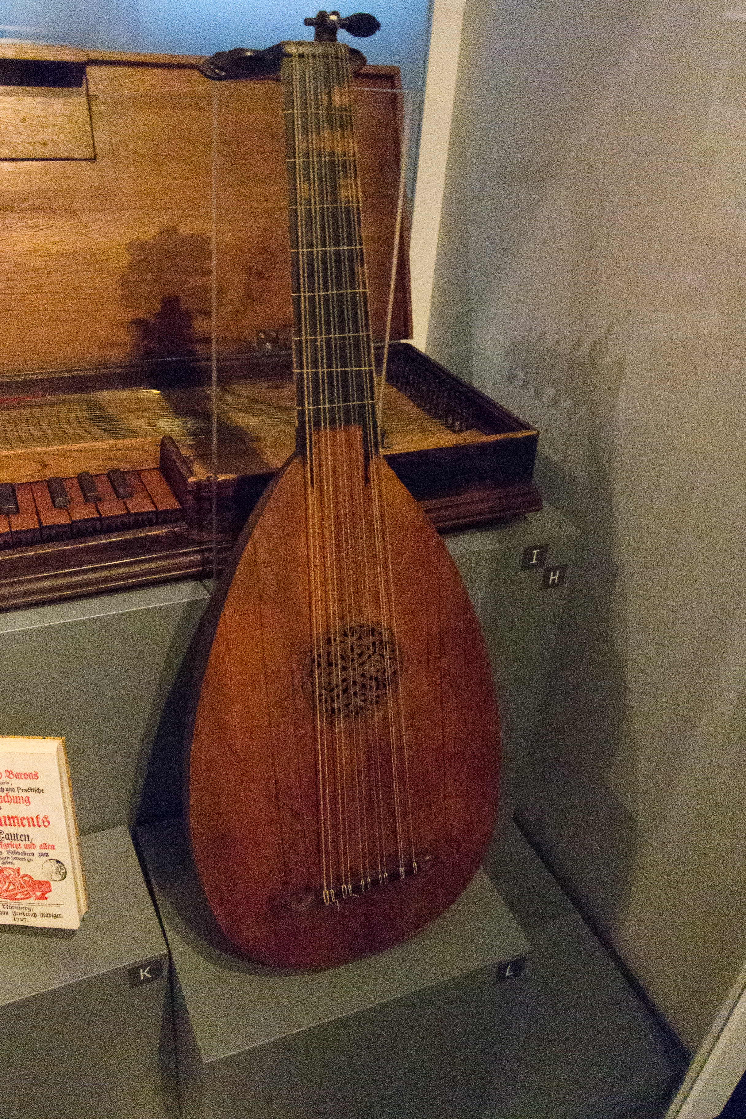 Lute ("Calchedon", "Calichon"), 1735 von Andreas Ferdinand Mayr in Salzburg hergestellt. “Lute 2, Leipzig 2012” References ULEI:M0000502 Laute, Museum für Musikinstrumente der Universität Leipzig, Inventory number 504. MIMO (musical instrument museums online)."​1735 von Andreas Ferdinand Mayr in Salzburg hergestellt.”, “Andreas Ferdinandus Mayr / Hof- Laut- und Geigenmacher / in Saltzburg. An. 17[h.s.]35”, “Gedr. Zettel des Erbauers auf der Innenseite des Rückens”, “Der rotbraun lackierte Korpus des ziemlich einfach gearbeiteten Instruments ist aus 9 breiten Spänen von geflammtem Ahornholz zusammengesetzt. Die Rückseite des gewinkelten Kragens ist mit durchbrochenen Schnitzereien im Renaissancestil verziert. Dieses Instrument verfügt im Gegensatz zur Barocklaute nur über sechs bis neun Saitenchöre. Das bevorzugte Dilettanteninstrument bezeichnete man in einigen Quellen auch als "Calchedon" oder "Calichon". " Georg Kinsky: Musikhistorisches Museum von Wilhelm Heyer in Cöln, Bd. 2, Köln 1912, S. 98.